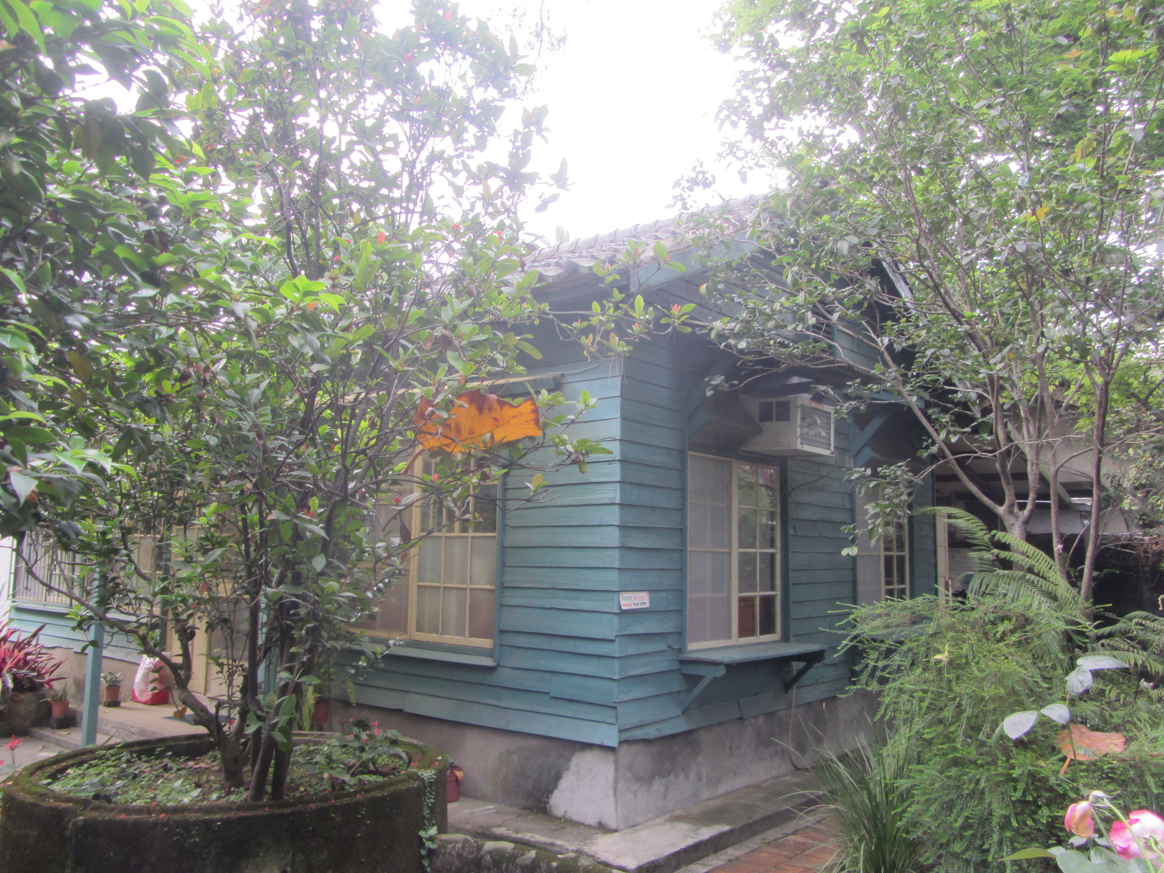 殷海光故居